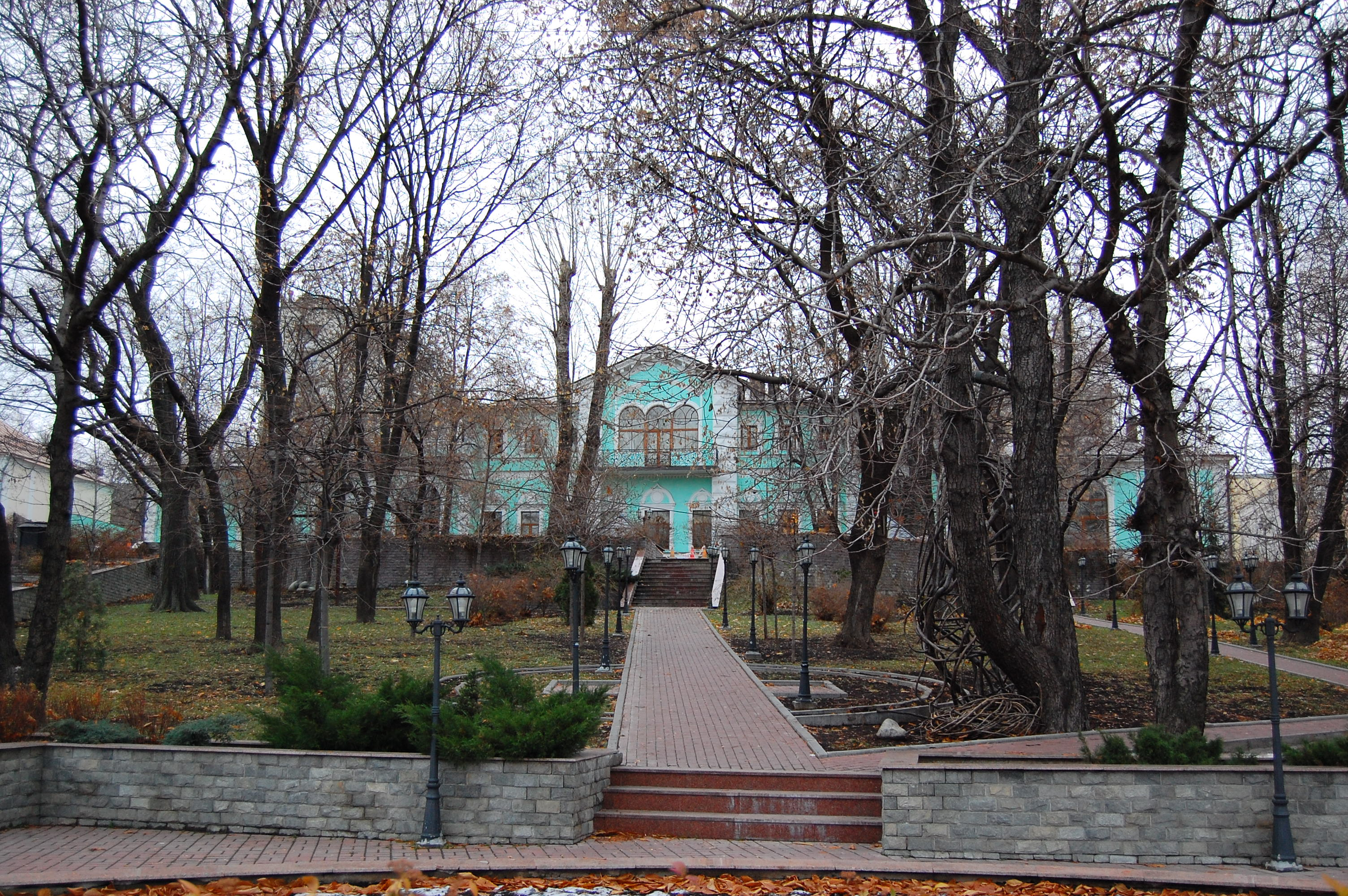 Дом Морозовой в Морозовском саду